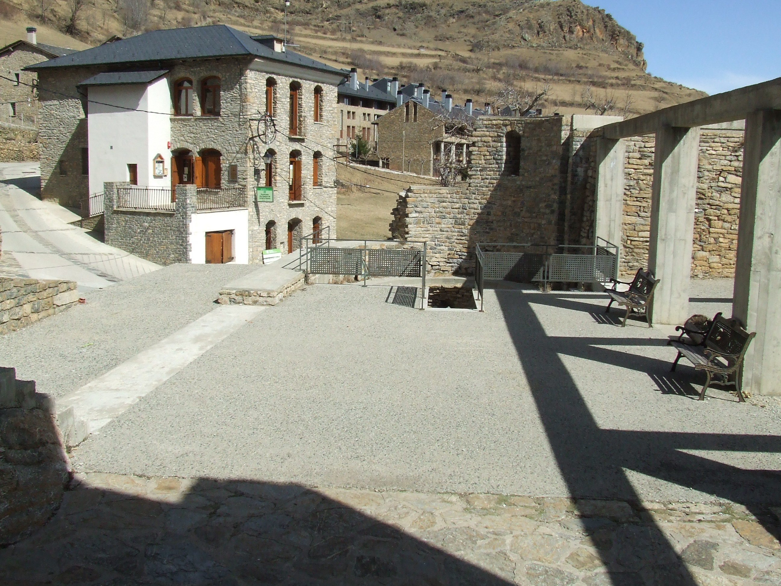 Sant Pere de Llessui (Sort, Pallars Sobirà)